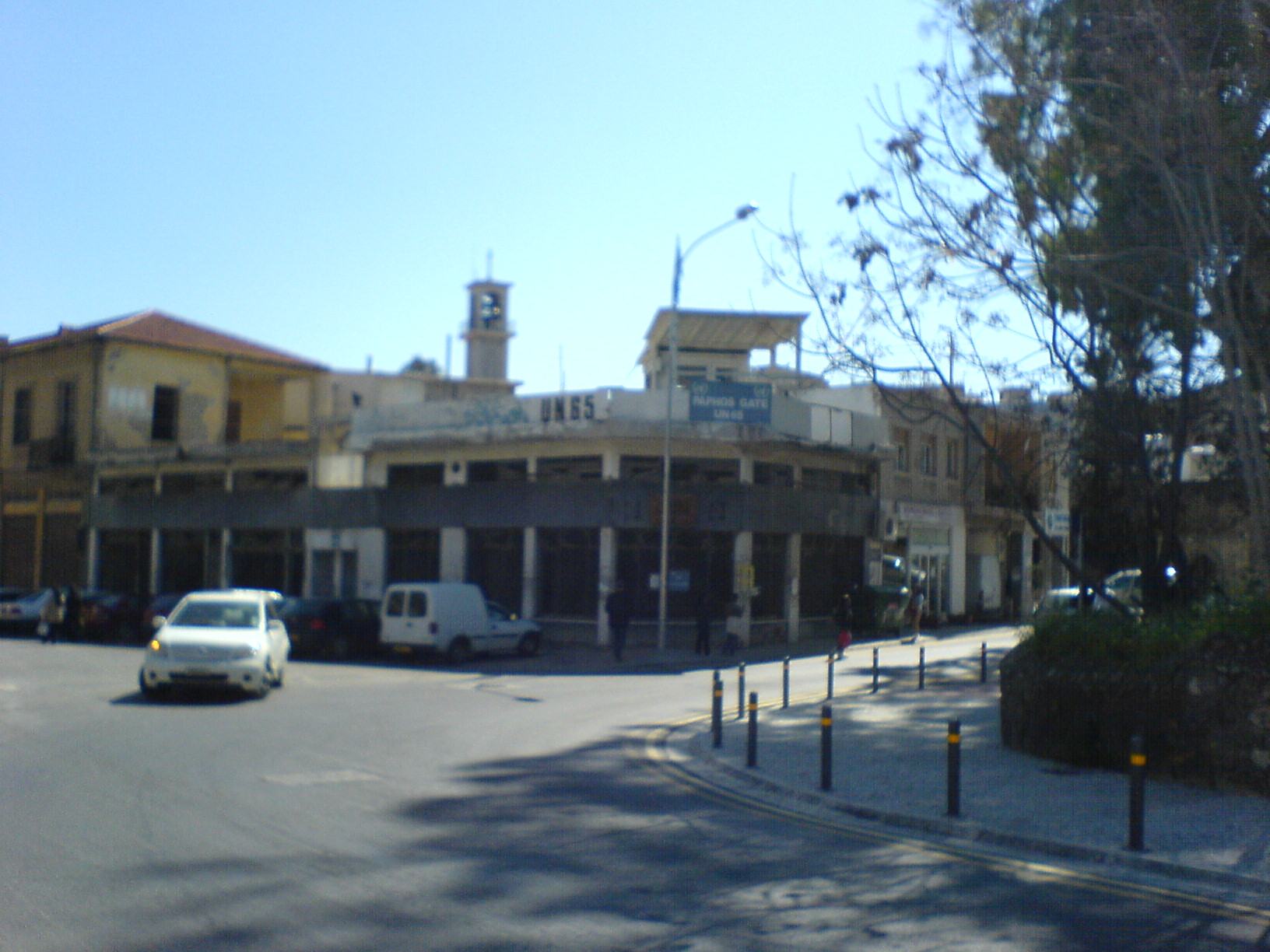 UN Paphos Gate control post in Nicosia, Cyprus